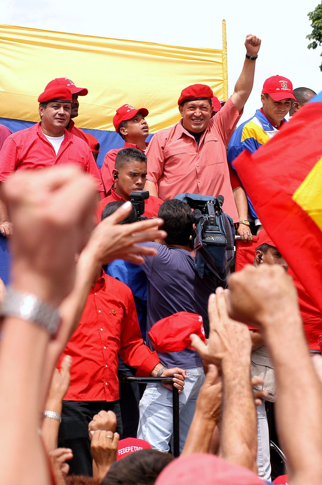 El presidente Chavez convoca a sus seguidores a la "Campana Santa Ines". Se preparan para las elecciones por del referendo revocatorio presidencial. Recorrido del Presidente por la avenida Bolivar. Lugar: Avenida Bolivar, Caracas, Venezuela. Fecha: 06 de Junio de 2004 Foto: Franklin Reyes/J.Rebelde